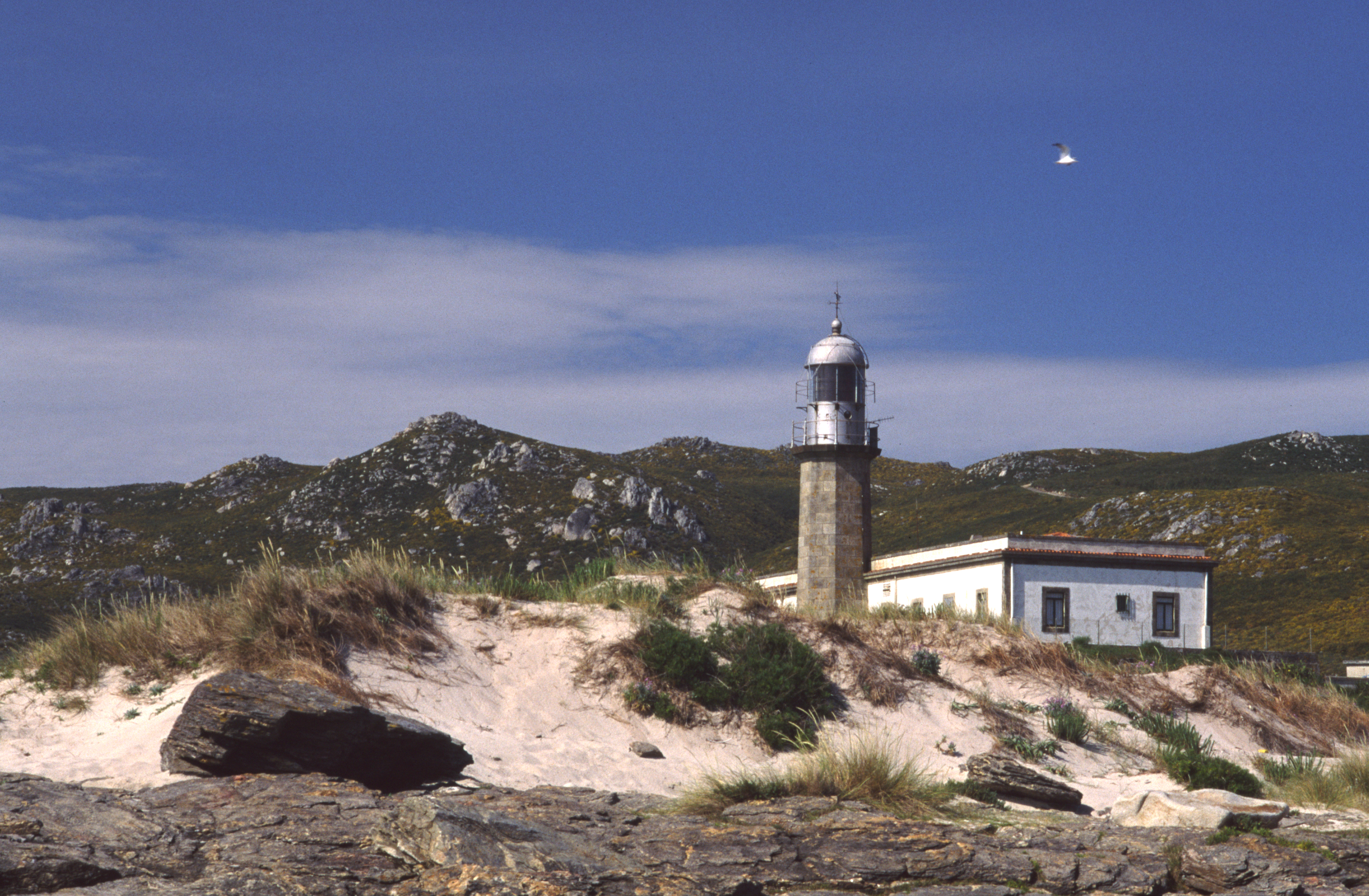 Faro de Lariño - Carnota - A Coruña